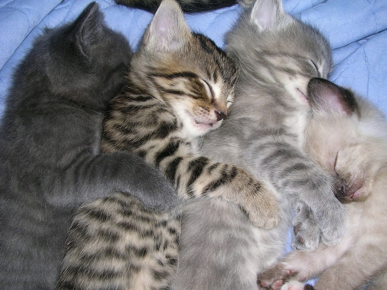 kittens spooning